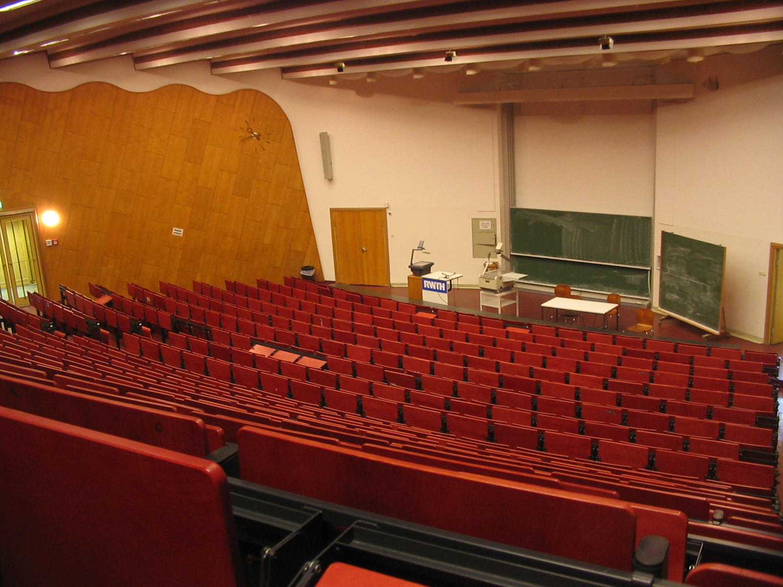 Roter Hoersaal der RWTH Aachen